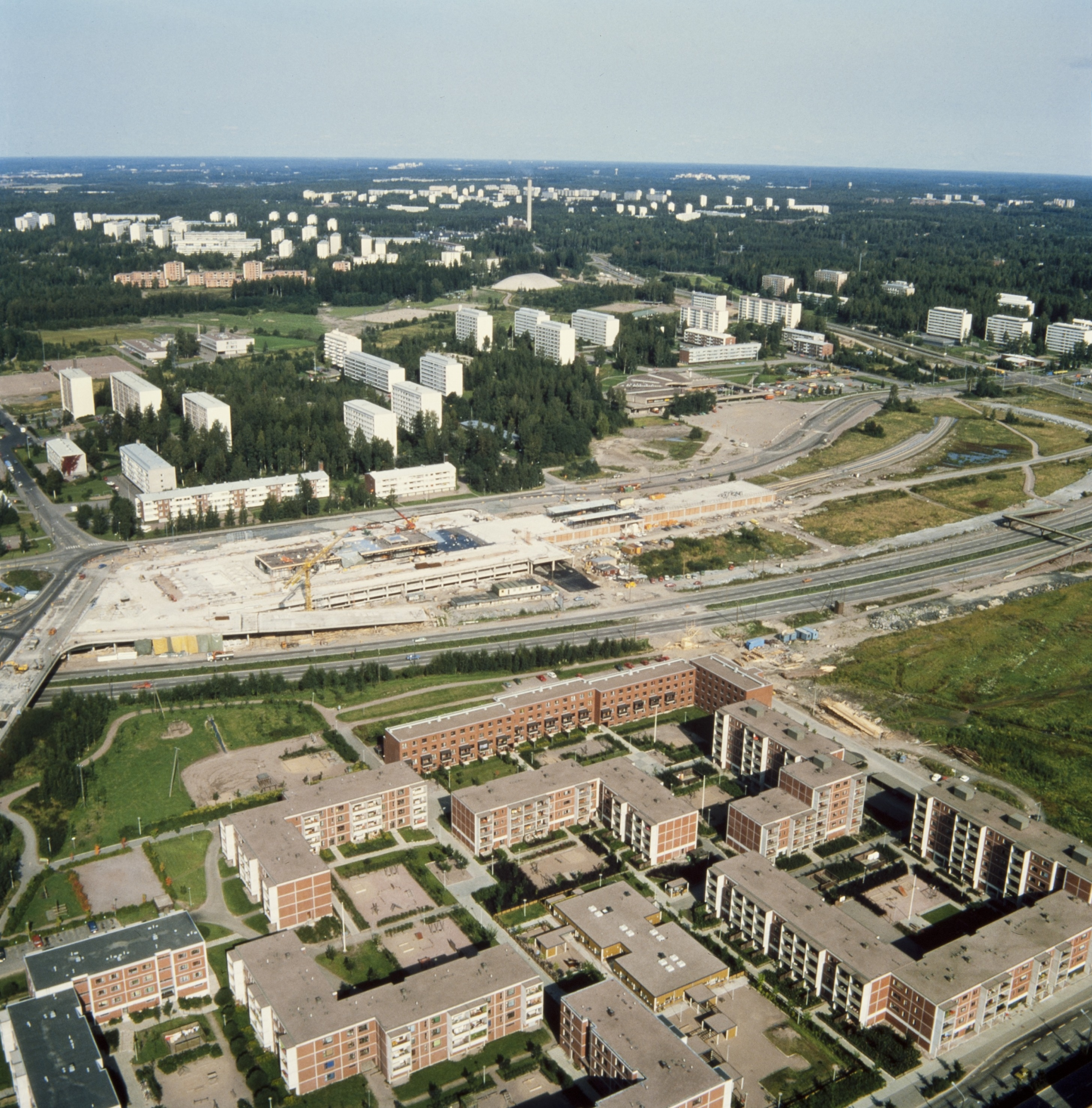 Etualalla Itäkeskus ja taustalla Puotinharju. Keskellä rakenteilla Itäkeskuksen ostoskeskus.